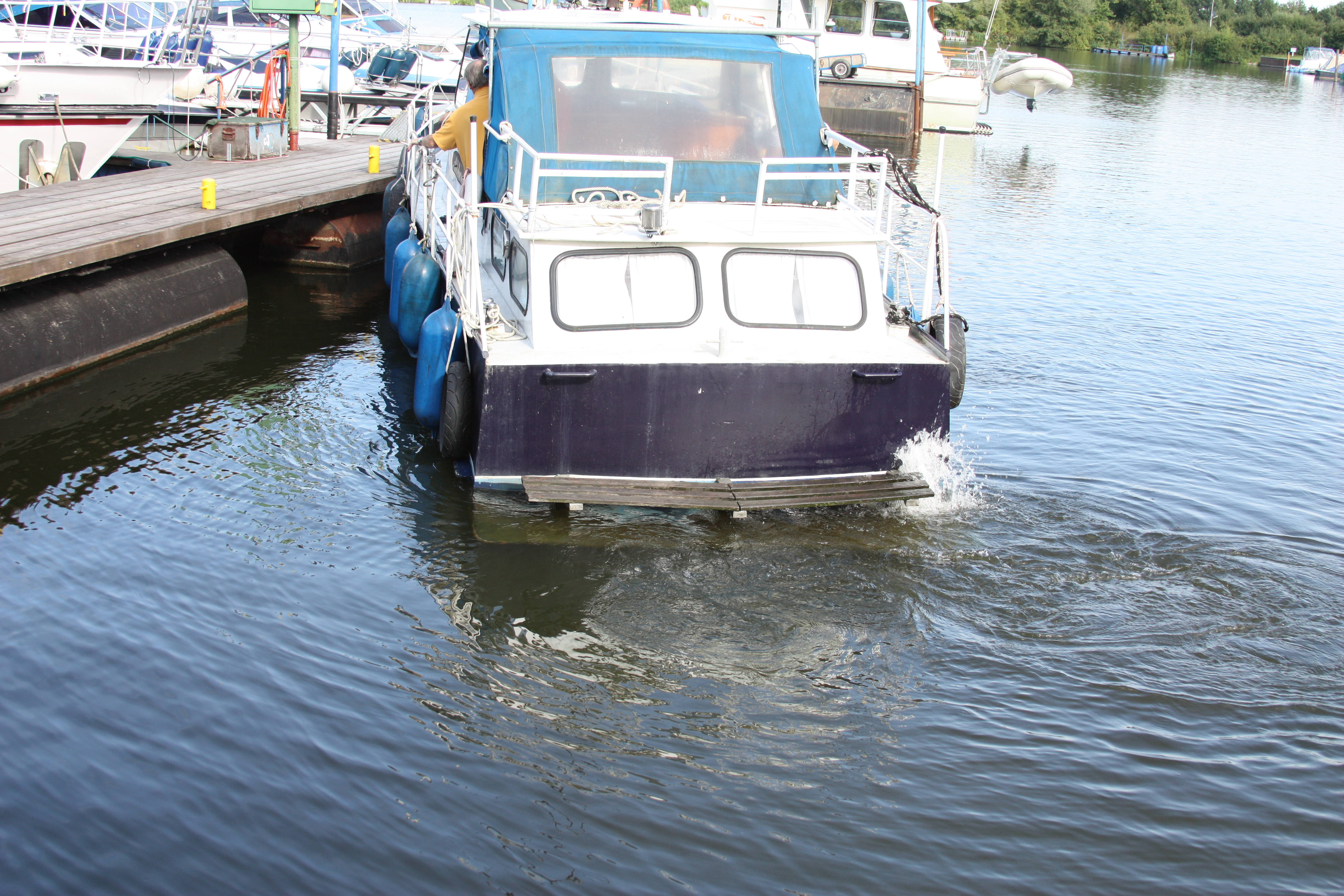 Anlegemanöver mit einem Motorboot; mit 45° langsam an den Steg fahren; mit Rückwärtsgang das heck an den Steg ziehen